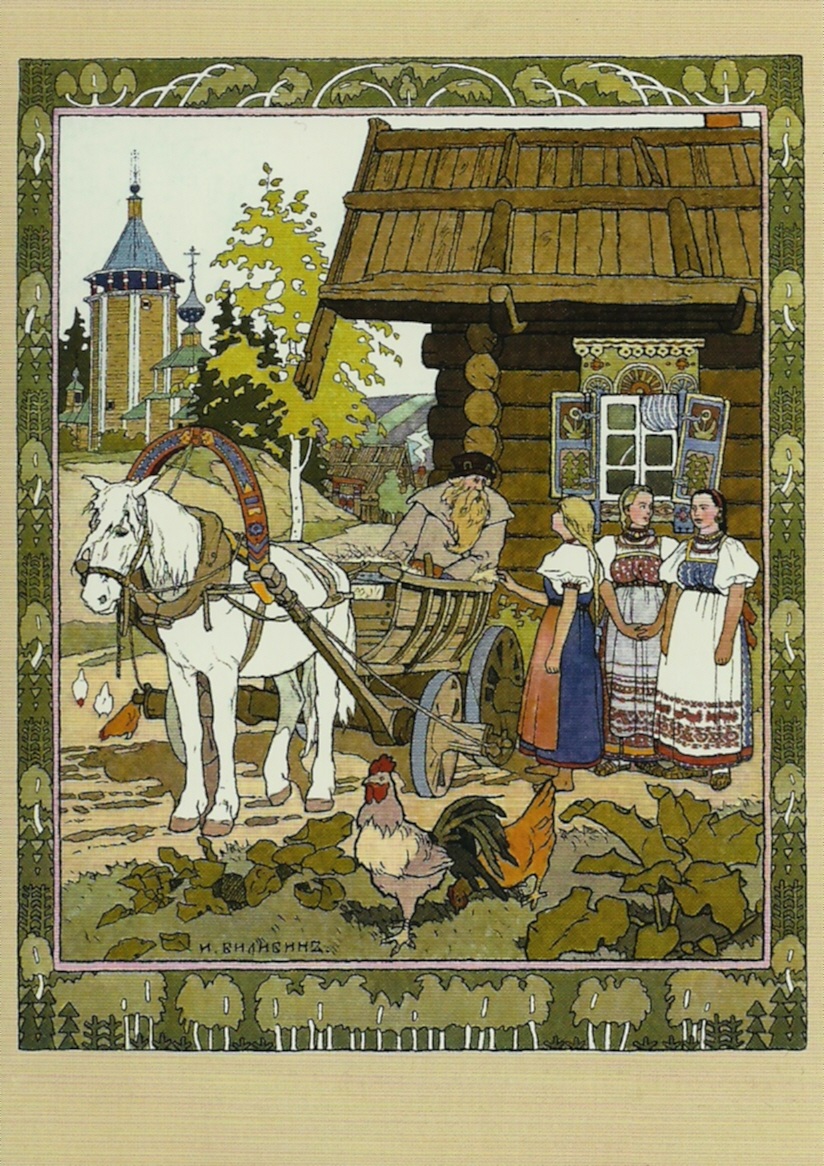 Финист Ясный Сокол